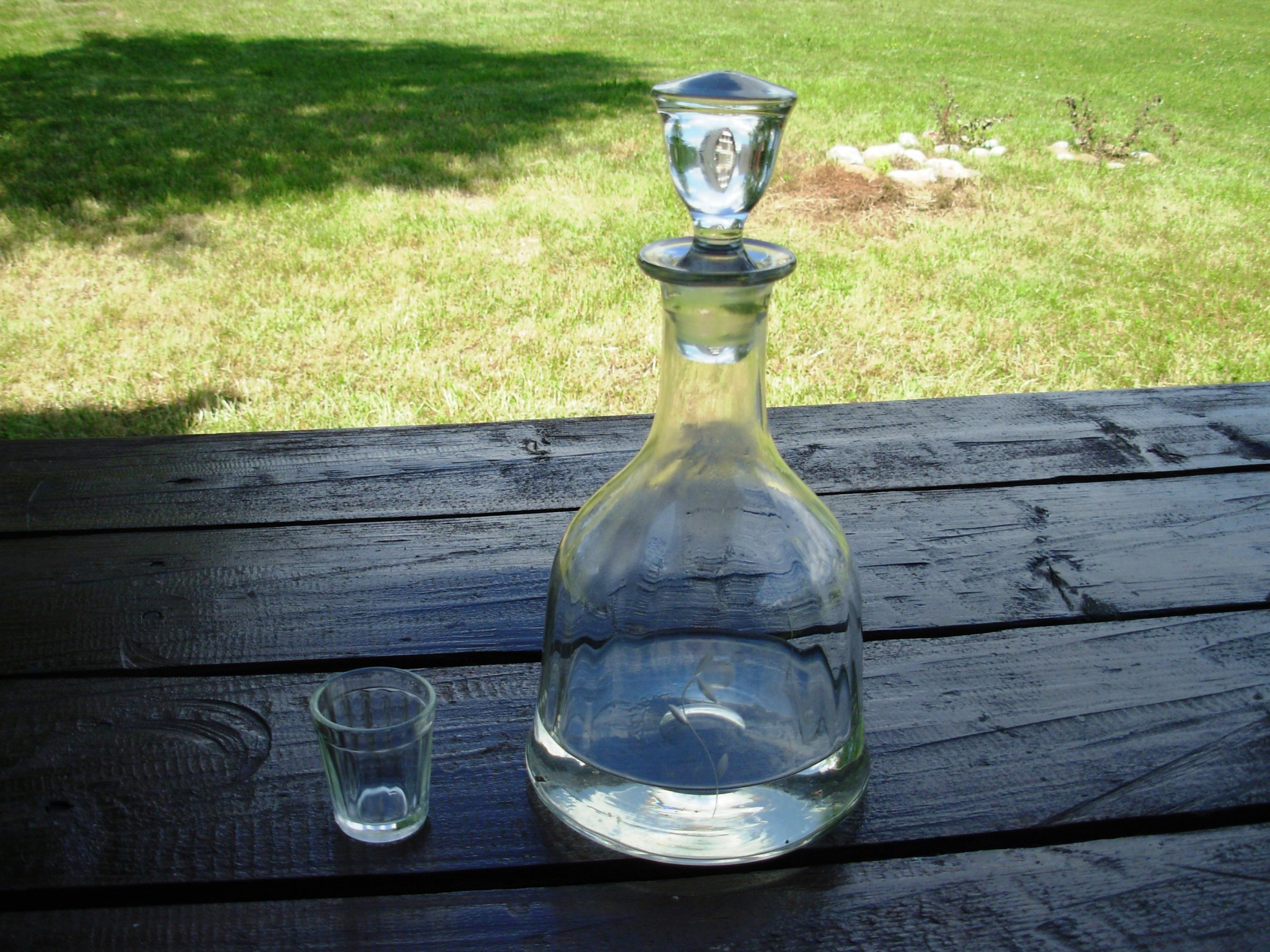 Аутор Голдфингер